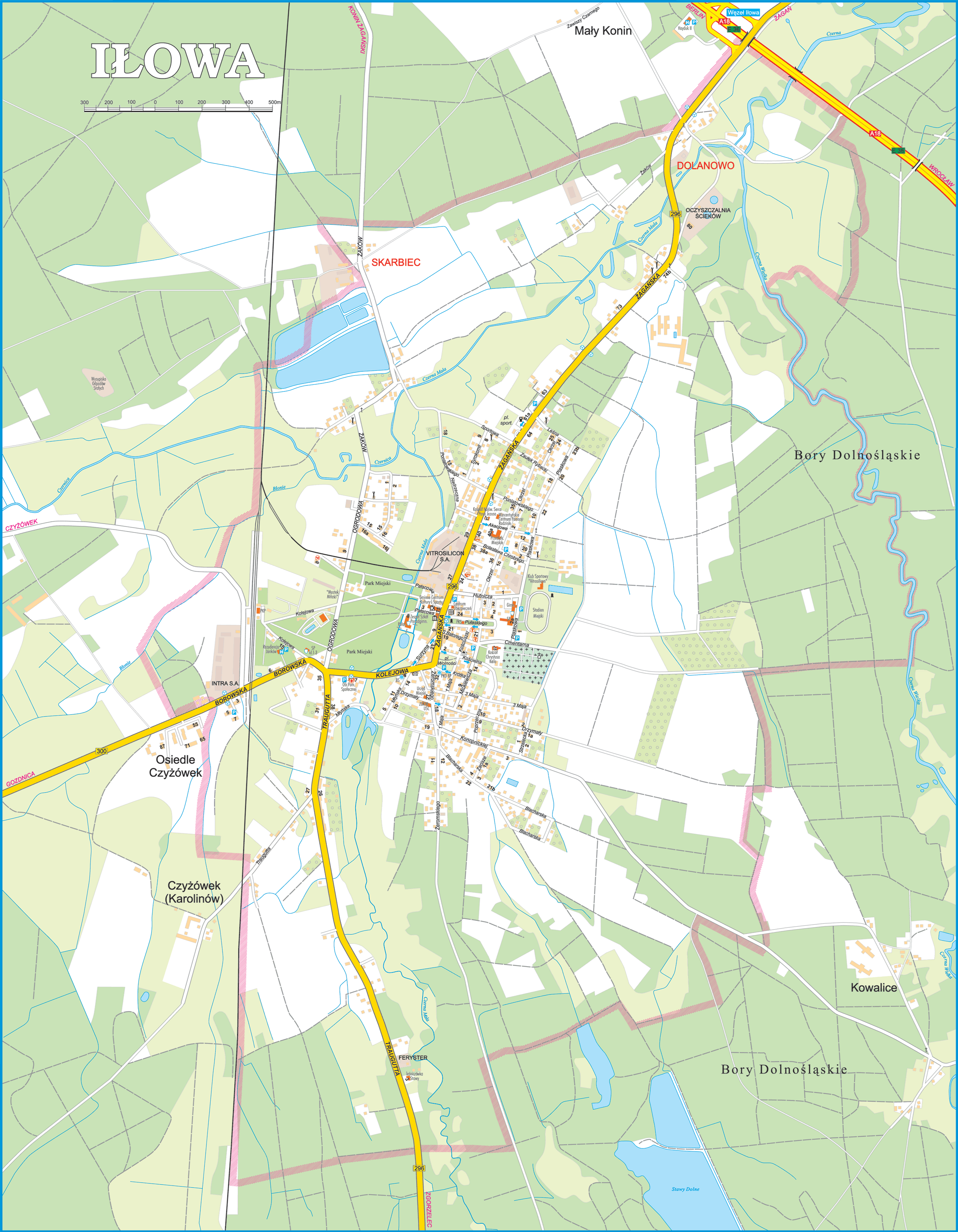 Mapa miasta Iłowa